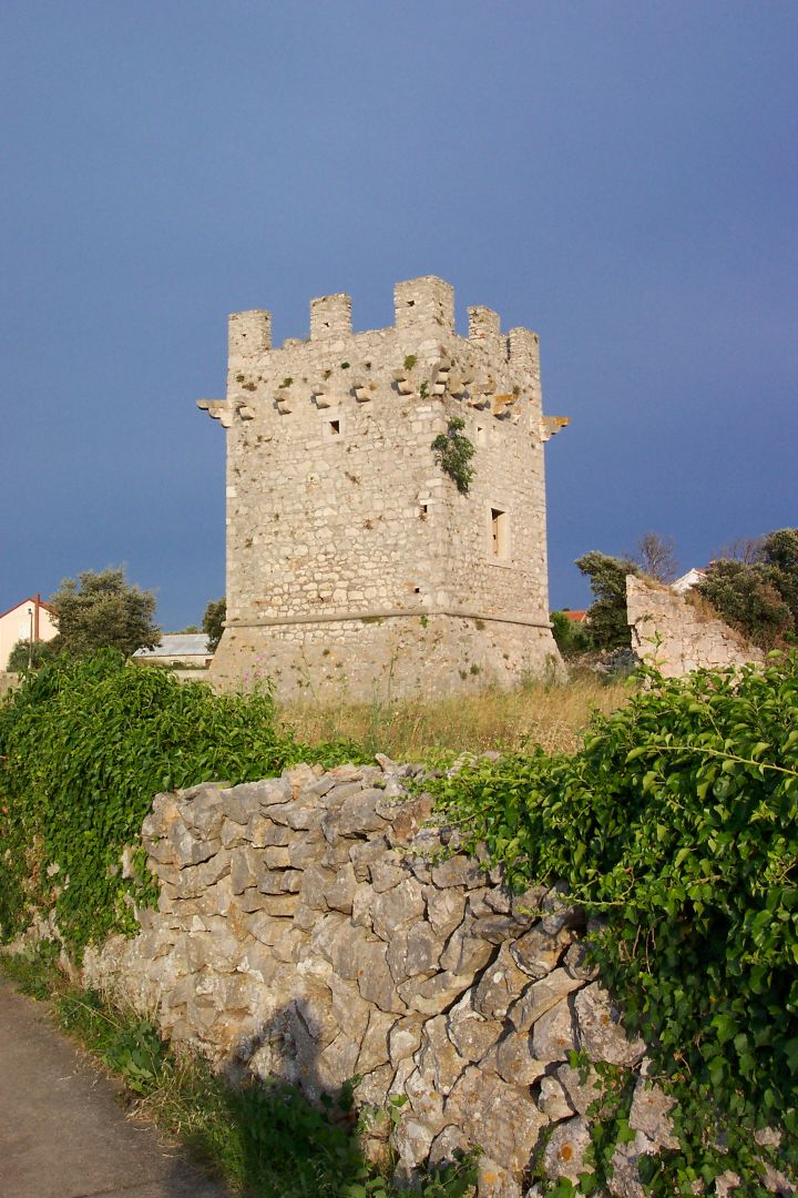 tower of Olib - Turm auf Olib Fotografiert von Nils Niederstebruch, Assling, Deutschland am 18.07.2004 Photographer von Nils Niederstebruch, Assling, Germany on July 18th,.2004